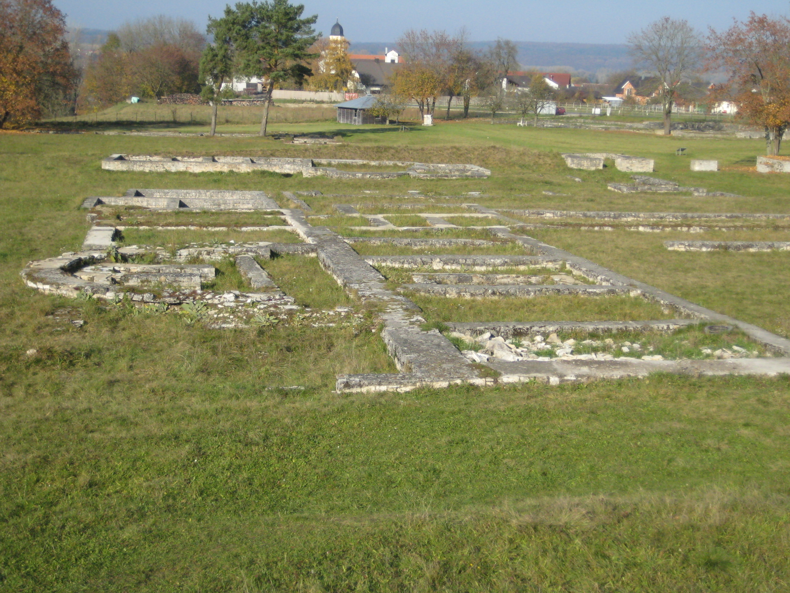 Kastell Eining: Prätorium und linkes Lagertor (am rechten Bildrand)